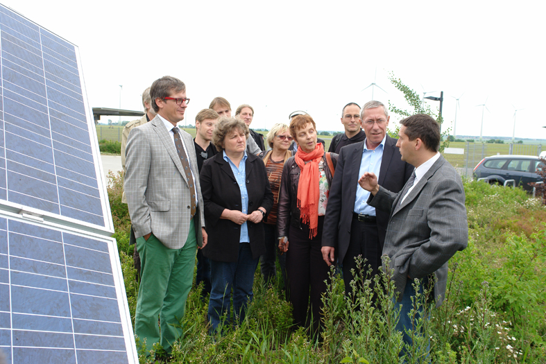 Der Bürgermeister von Treuenbrietzen Michael Knape erläutert die Solarmodulherstellung im Bioenergiedorf Feldheim. Dabei auch der LINKE Brandenburger Staatssekretär im Landesministerium für Umwelt und Gesundheit, Daniel Rühmkorf (li.)